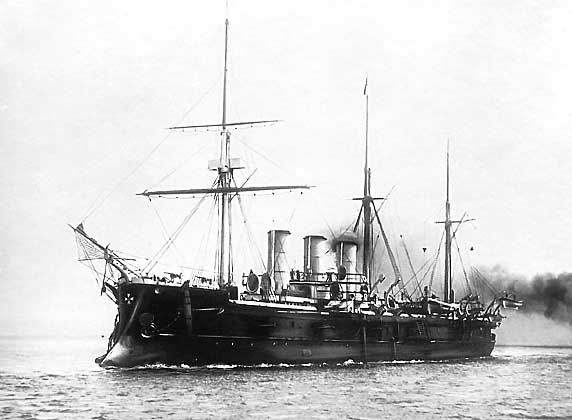 Russian cruiser Pamiat Azova 1890